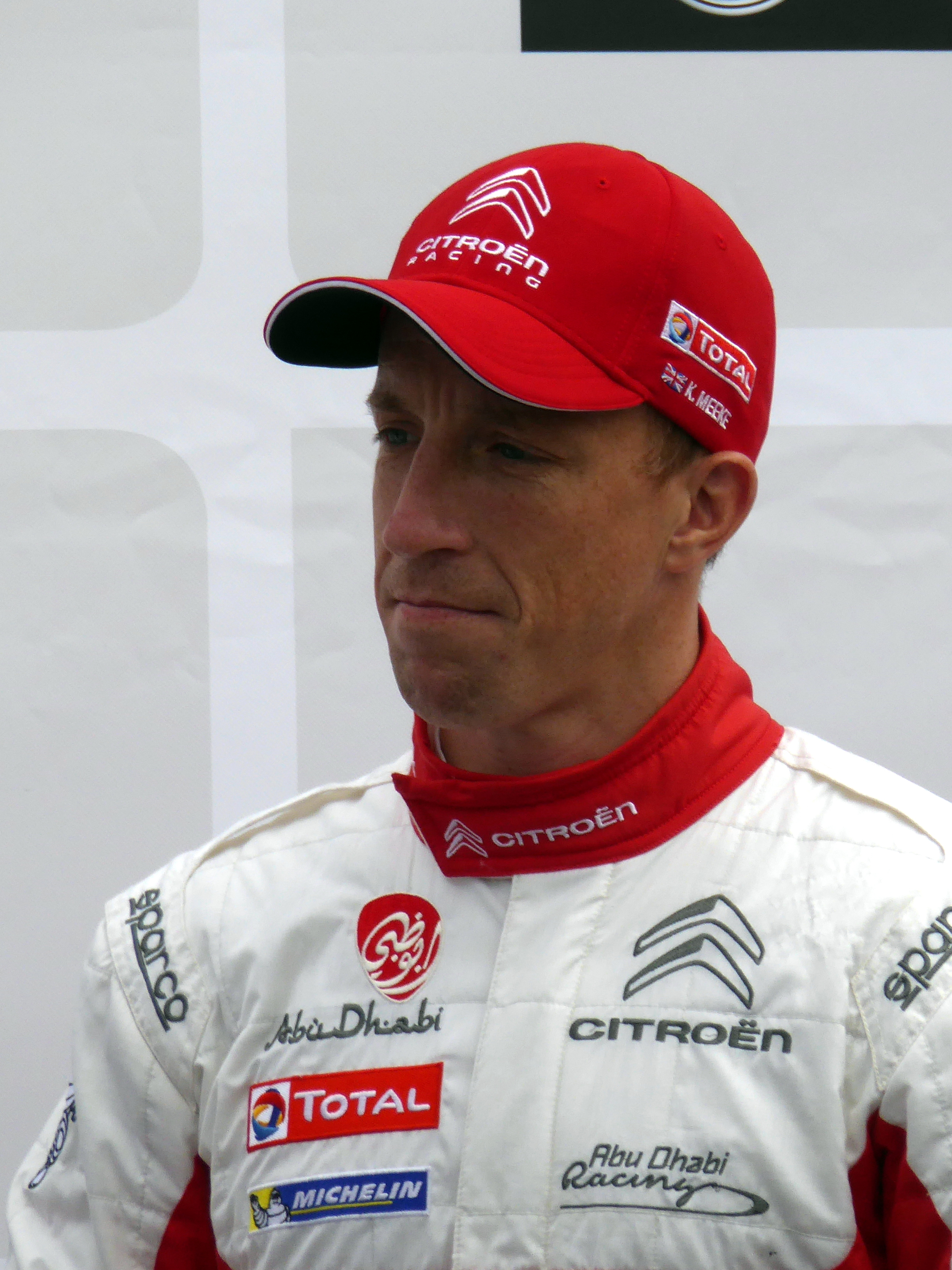 Rallye Deutschland 2017, Eröffnungszeremonie auf dem Tbilisser Platz in Saarbrücken